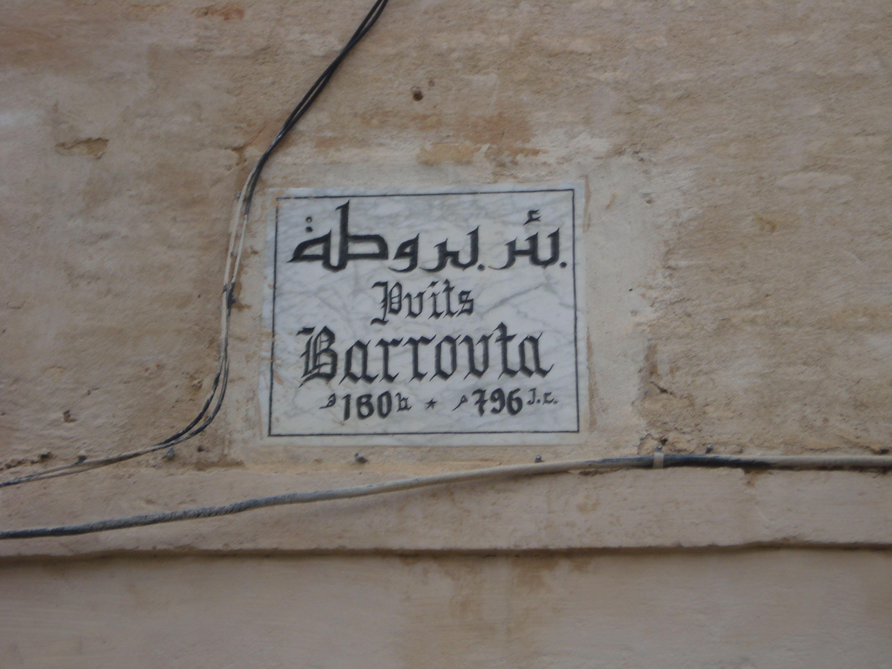 Plaque rappelant la création en 796 du puits Barrouta à Kairouan (Tunisie)